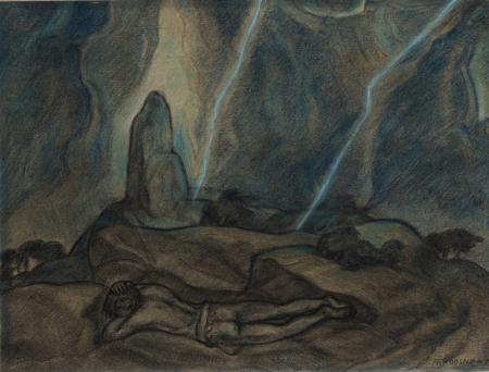 Iru ämm, pastell, 1918